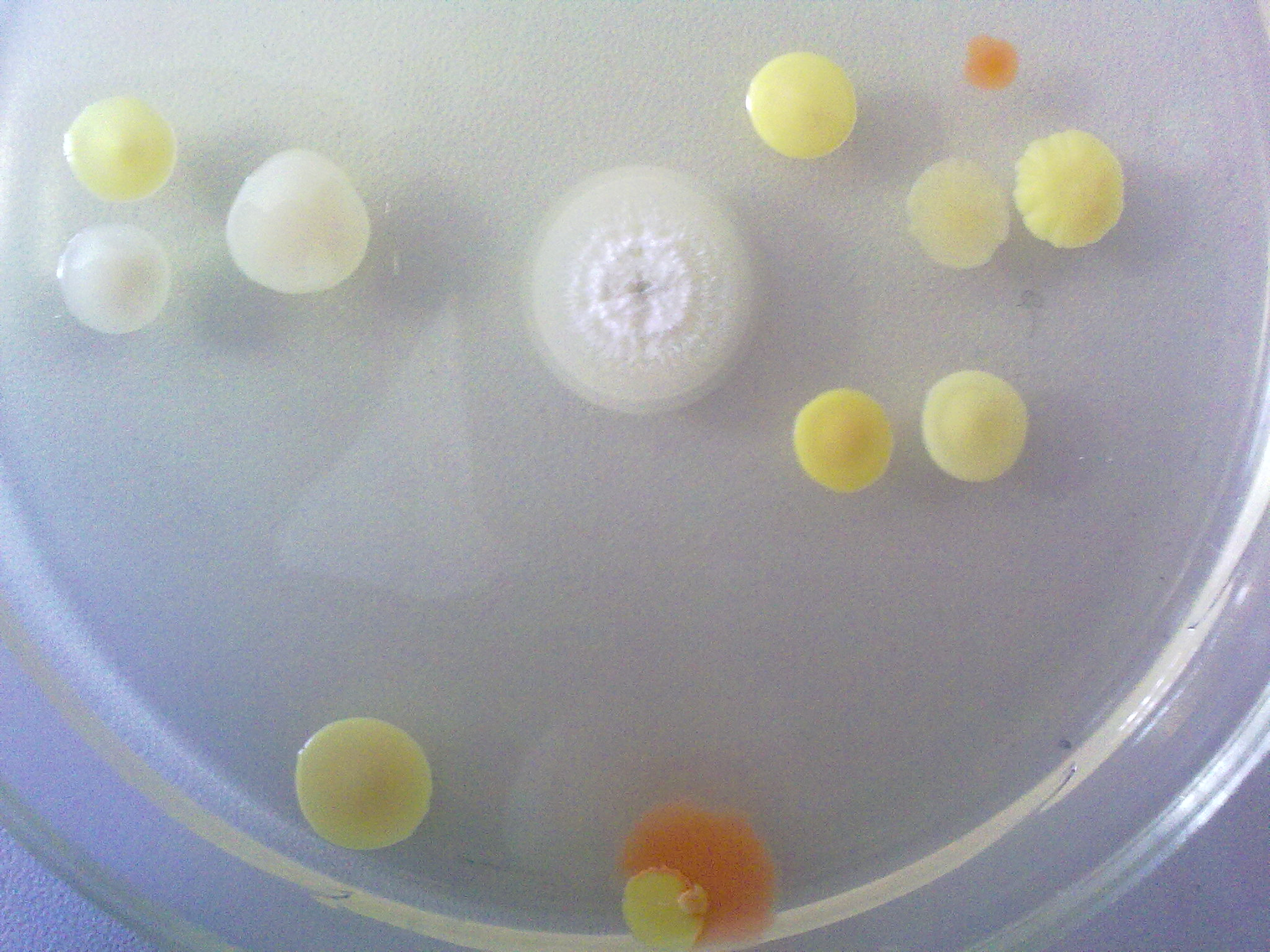 Söötmel olevad õhubakteri kolooniad.